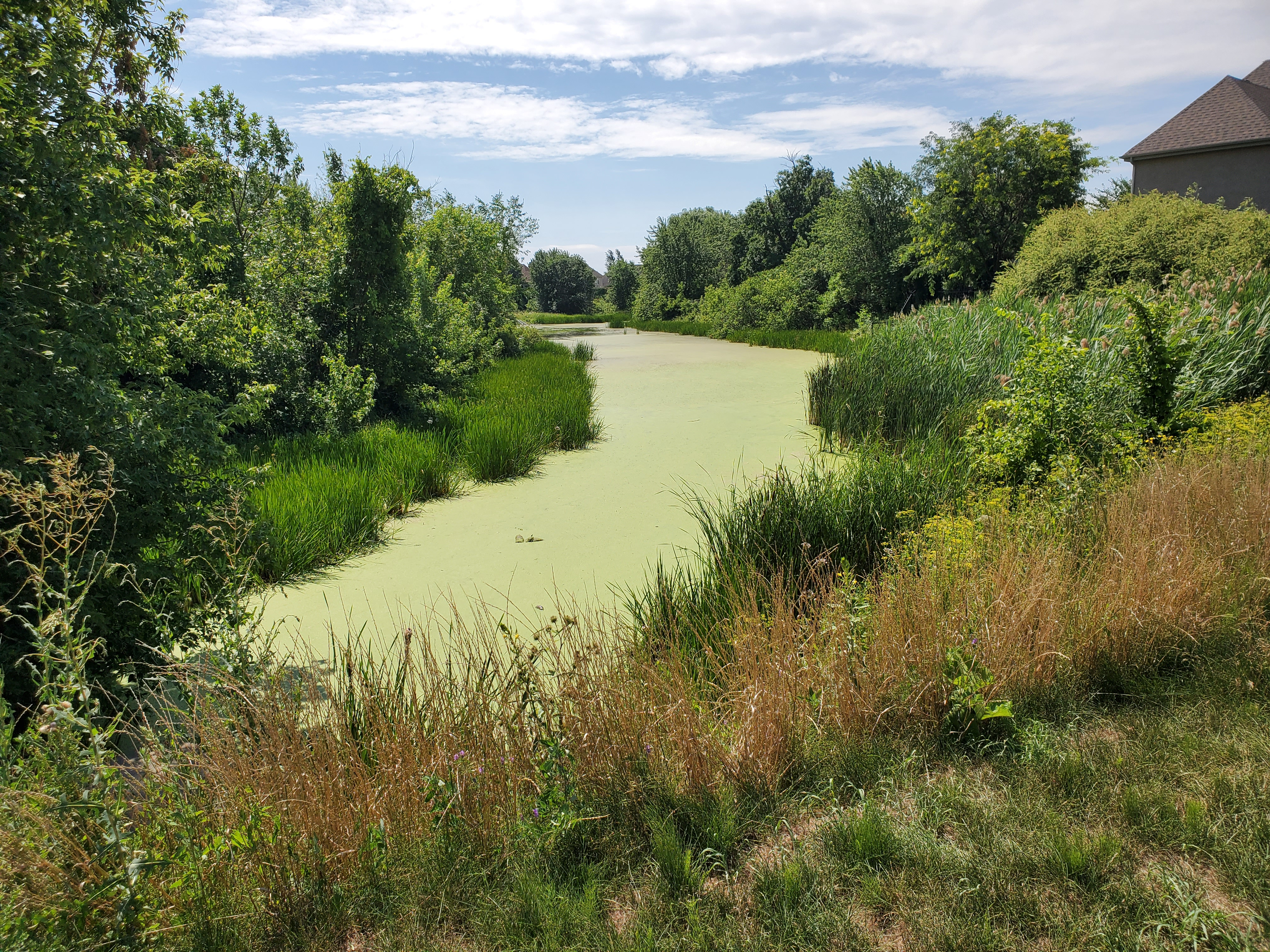 Zone de marais dans une aire protégée